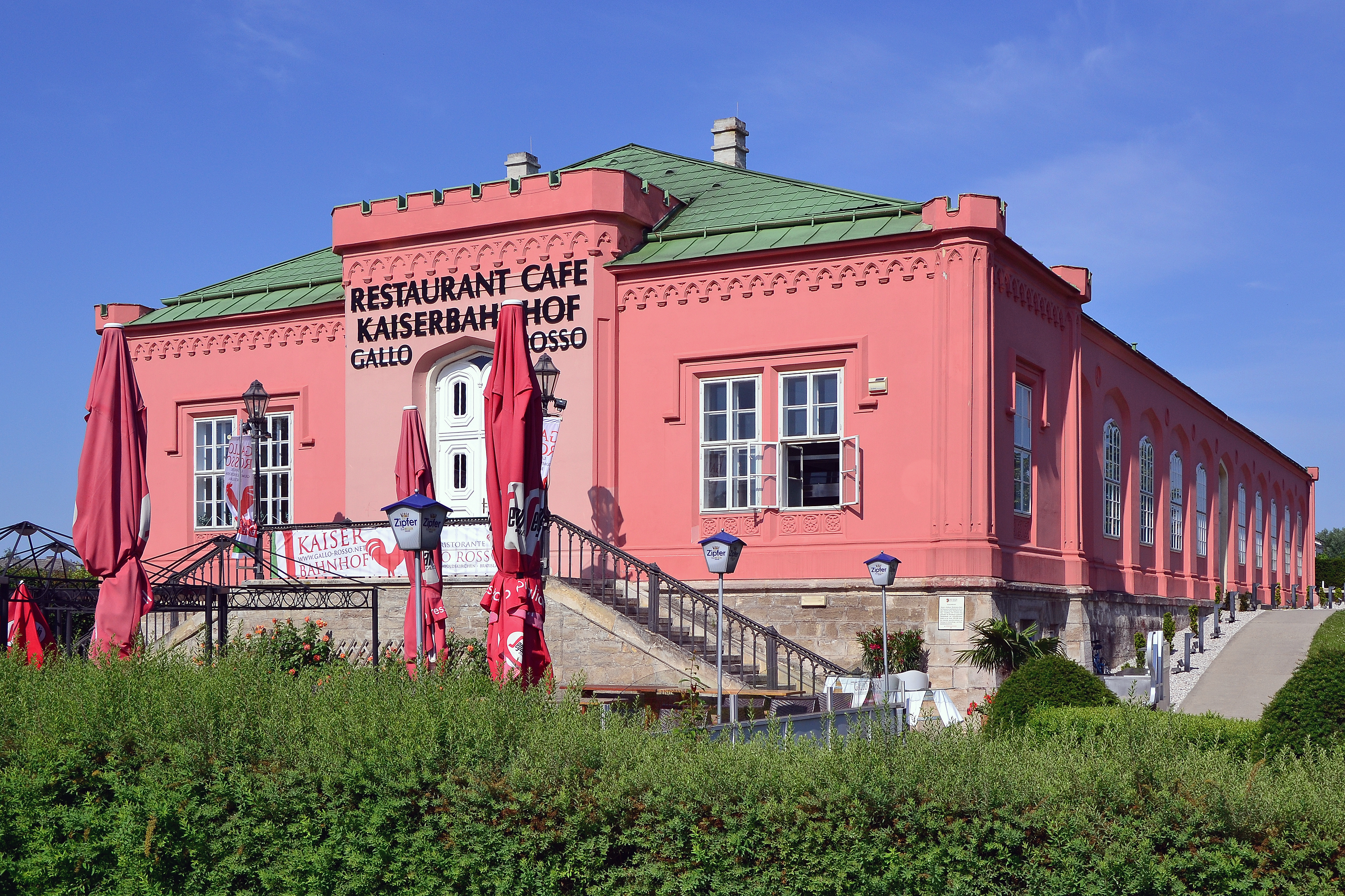 erbaut 1847